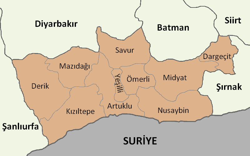 Mardin'in ilçelerini gösteren harita